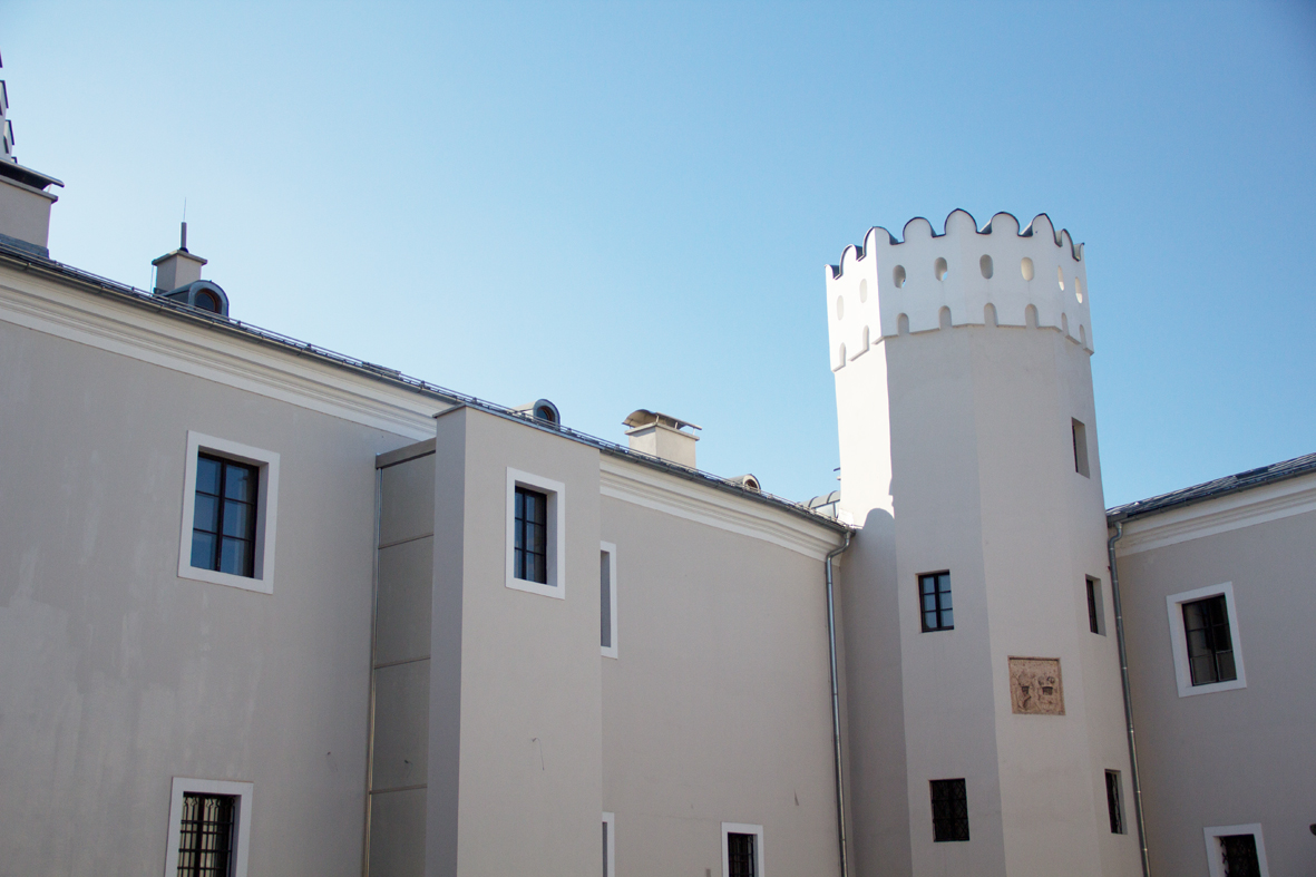 Schloss Ebelsberg Innenhof mit Turm